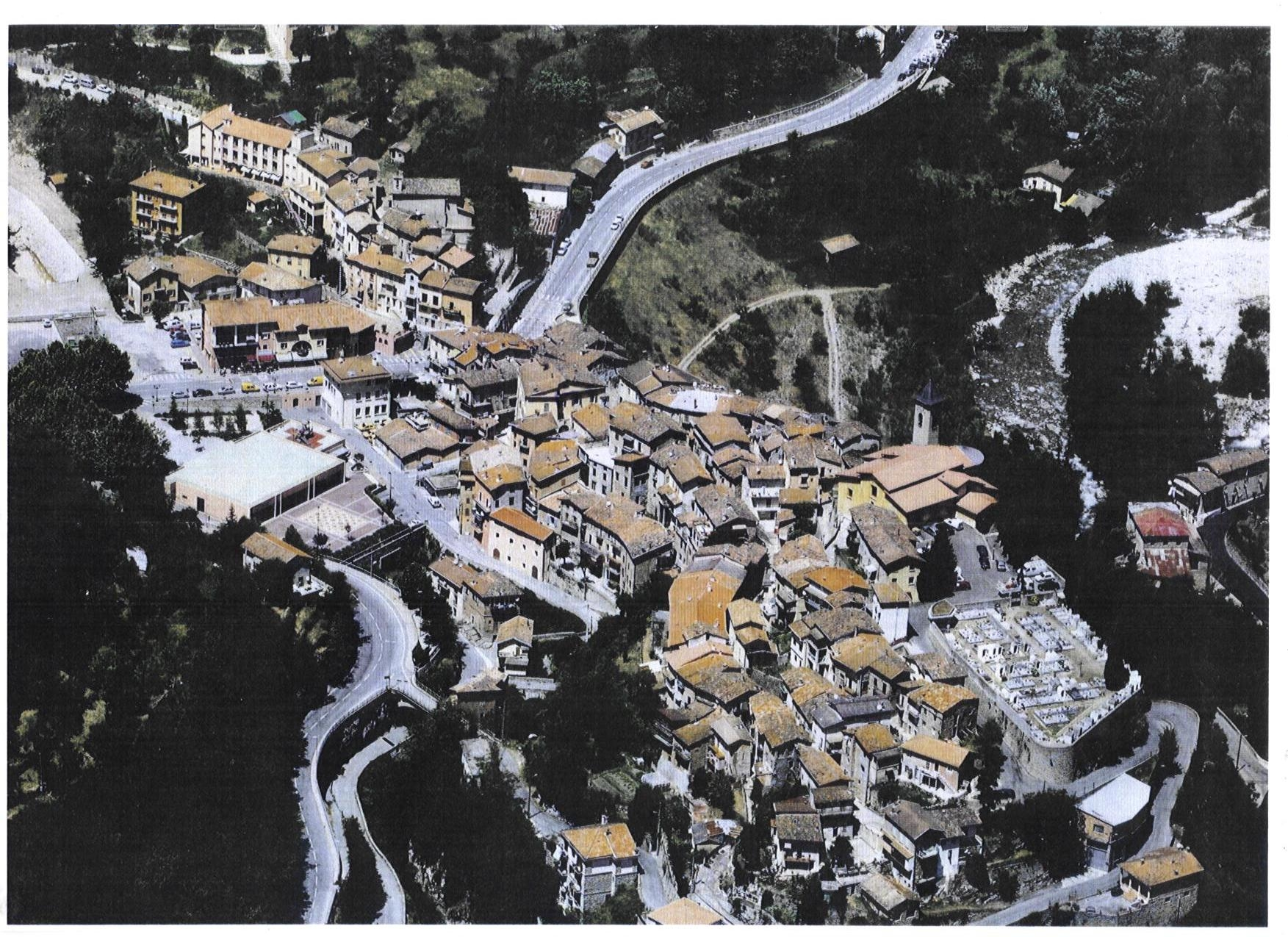 Lantosque vu du ciel. On aperçoit l'Eglise st Pons au sommet du village, à ses côtés le cimetière. Aux pieds du village, la salle polyvalente. En haut à droite la Vésubie, sur la gauche, le Riou passant sous la salle polyvalente et longé par la route.